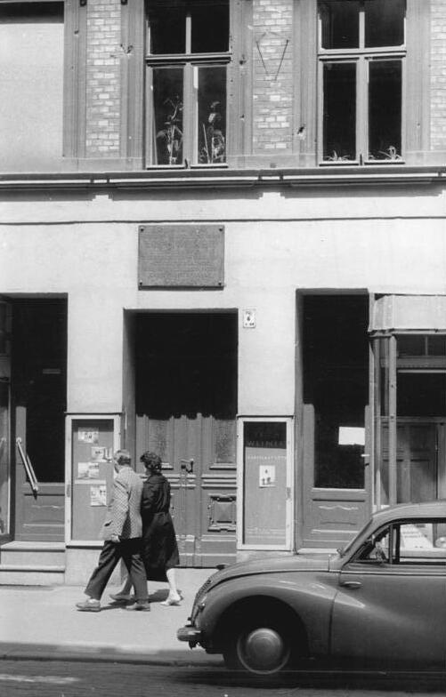 Magdeburg, Erich-Weinert-Gedenkstätte Zentralbild Biscan 26.6.1962 Die Erich-Weinert-Gedenkstätte in Magdeburg In Magdeburg wurde 1961 im Geburtshaus des Arbeiterdichters Erich Weiner eine Erich-Weinert-Gedenkstätte eingerichtet, in der viele Dokumente, Fotos, Zeitungsausschnitte, Plakate und Tonbilder einen Überblick über das politische und literarische Schaffen des großen Sohnes der Arbeiterklasse geben. UBz: Der Eingang in das Geburtshaus Erich Weiners. Darüber eine Gedenktafel.